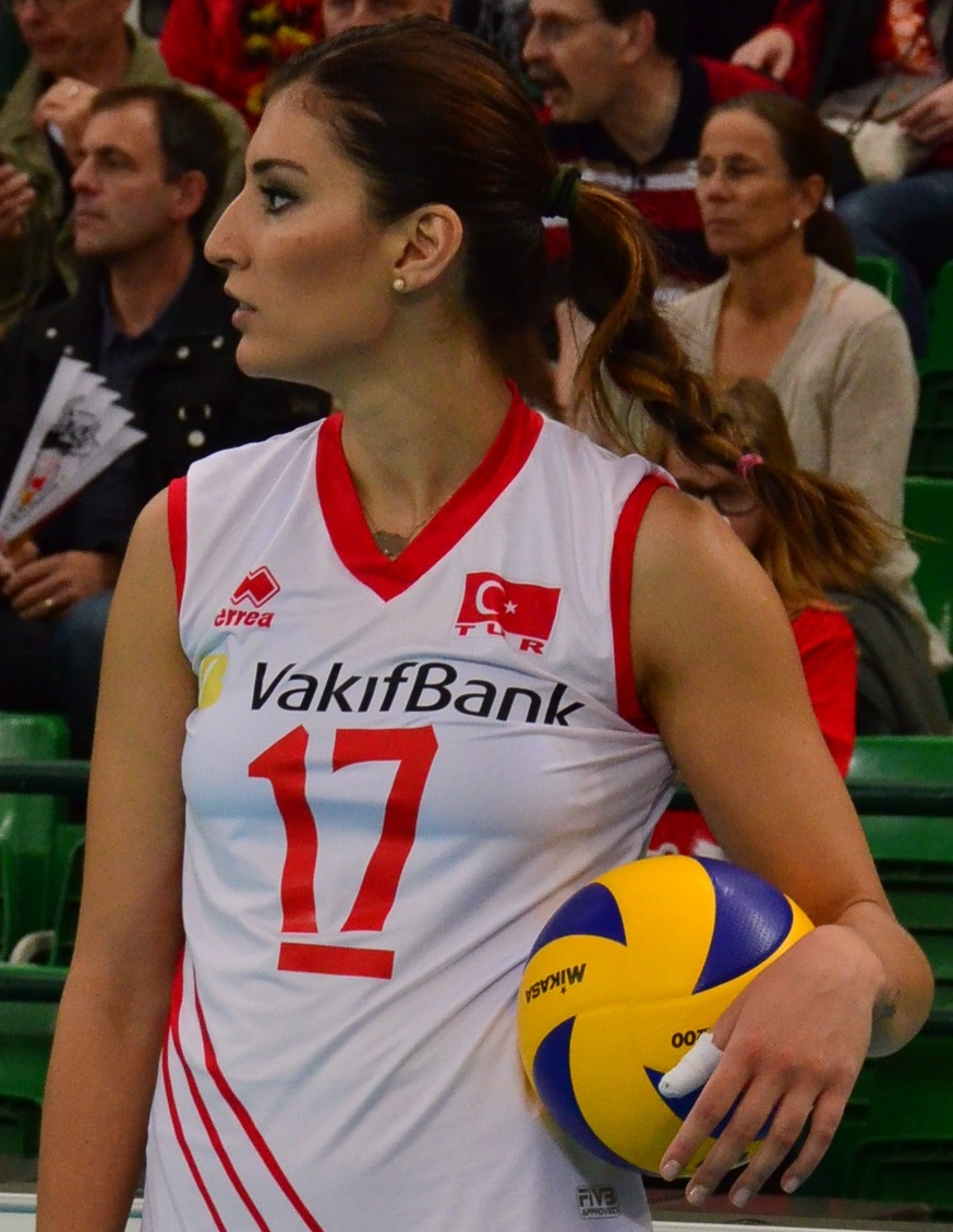 Volleyball-Europameisterschaft der Frauen 2013-Spielort Halle (Westf) Gerry-Weber-Stadion - Spiel 8. September 2013 (Deutschland-Türkei)